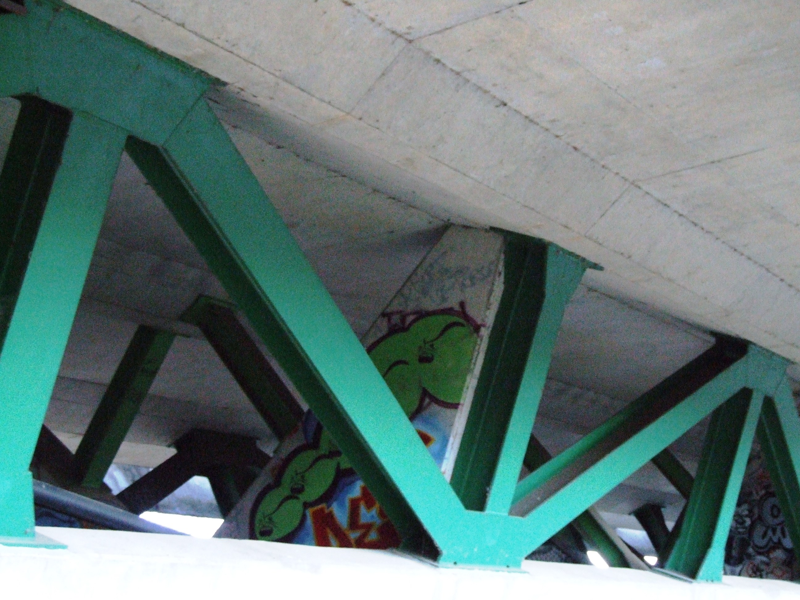 RN83 - Pont d'Arbois sur la Cuisance - Triangulation